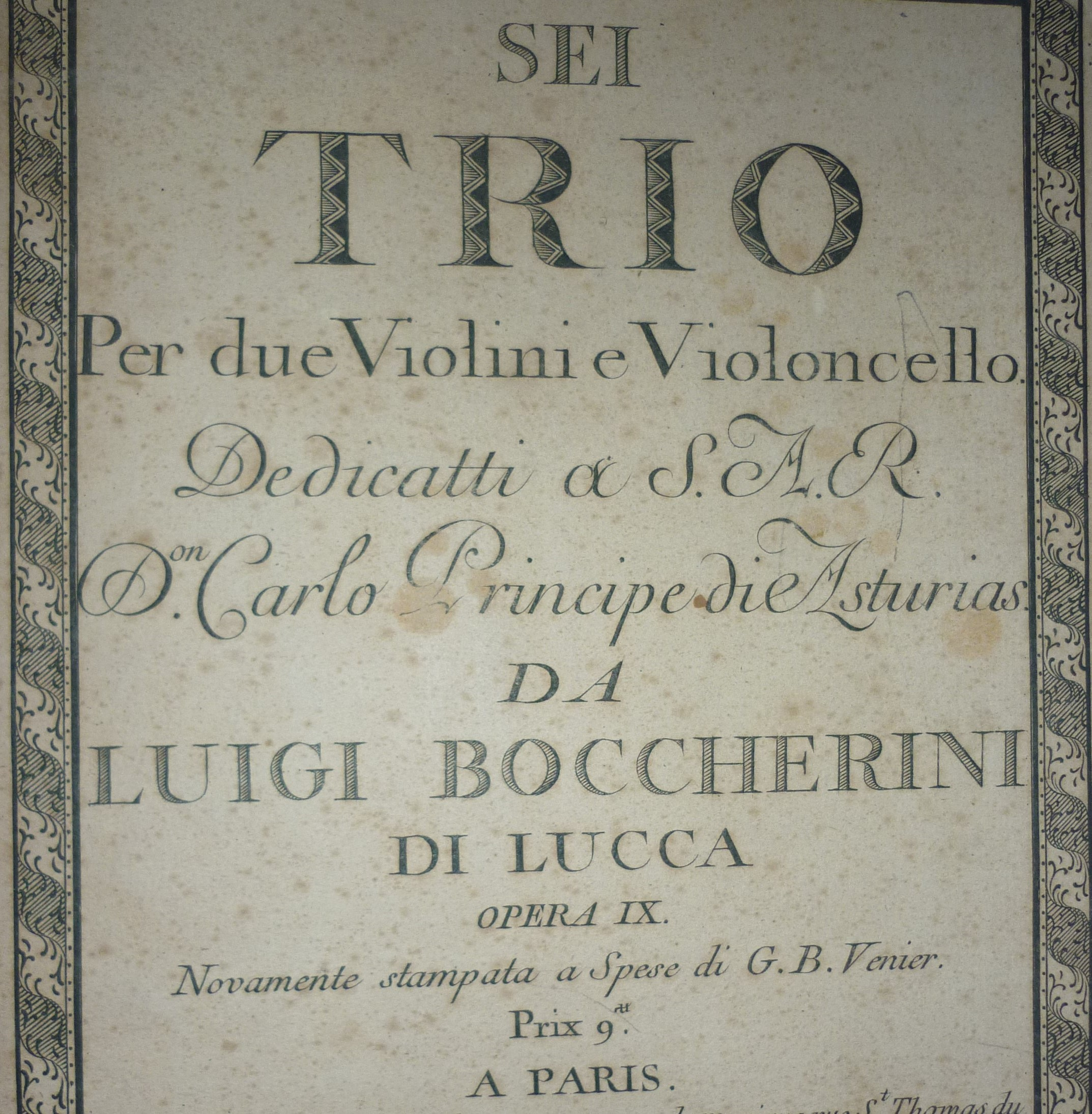 Six trios à cordes opus 6 (1771) de Boccherini, publiés par Venier à Paris.